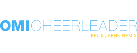 Logotipo del remix de la canción "Cheerleader"